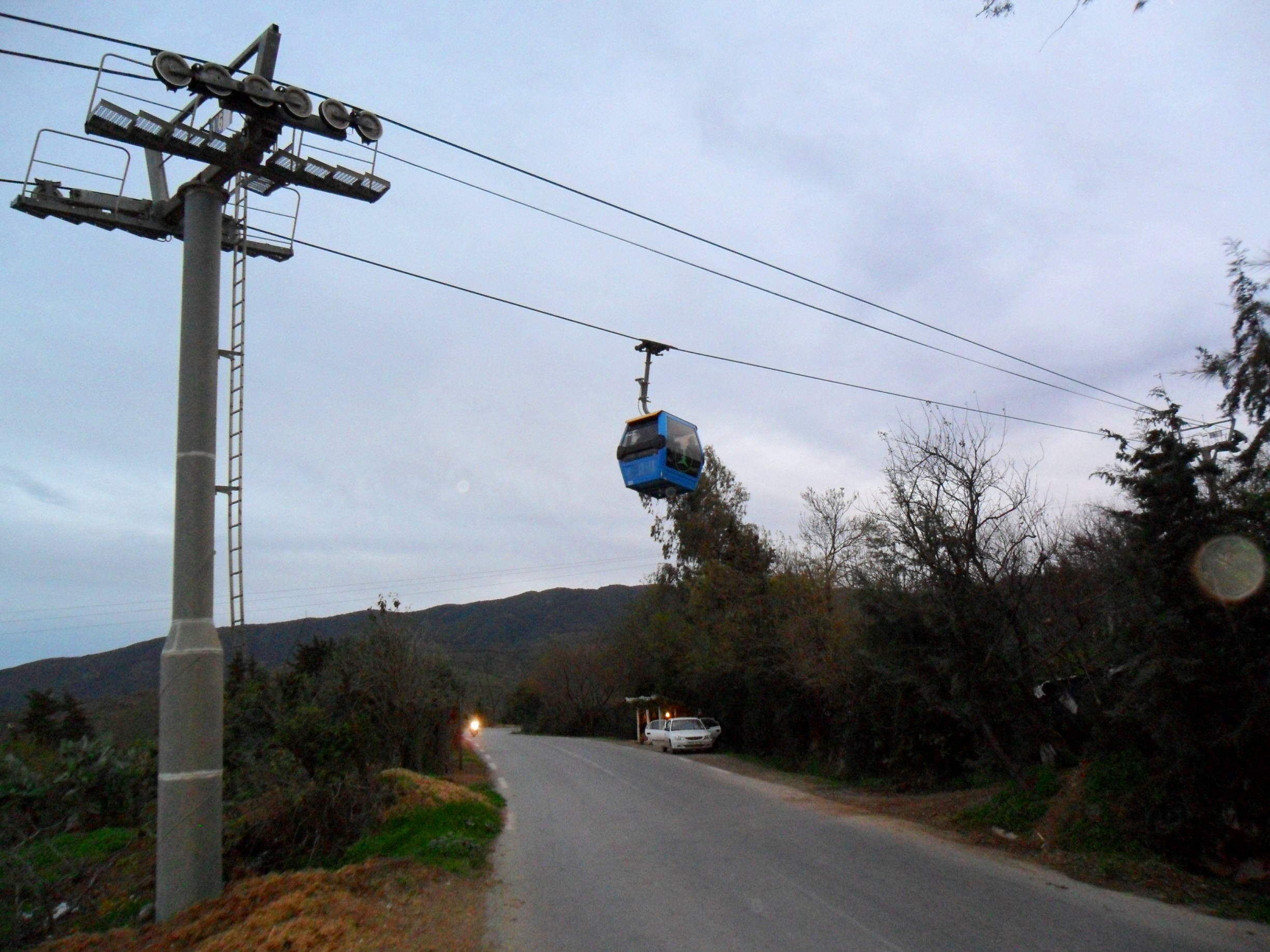 Telefirique